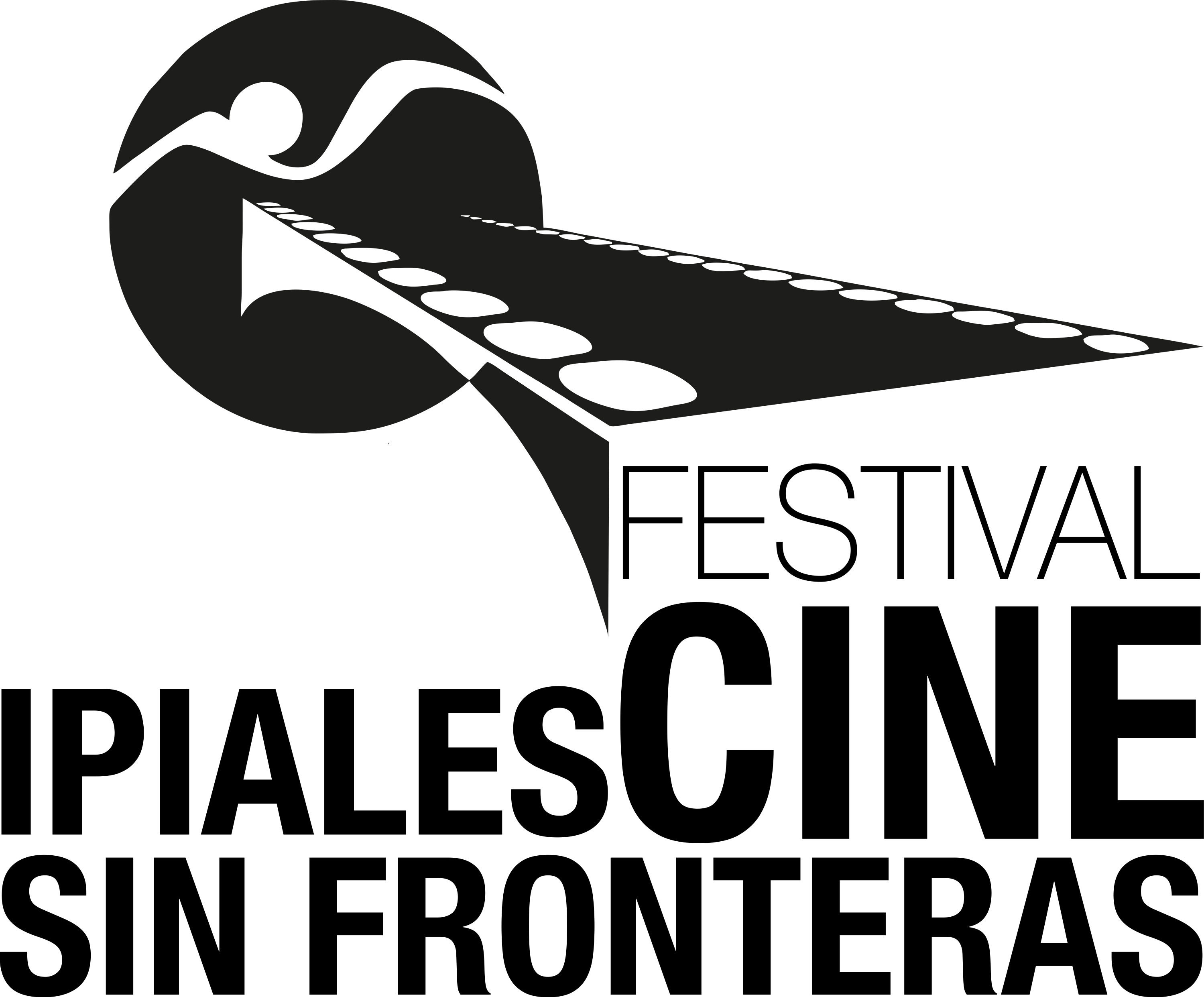 Logotipo Festival Ipiales Cine Sin fronteras